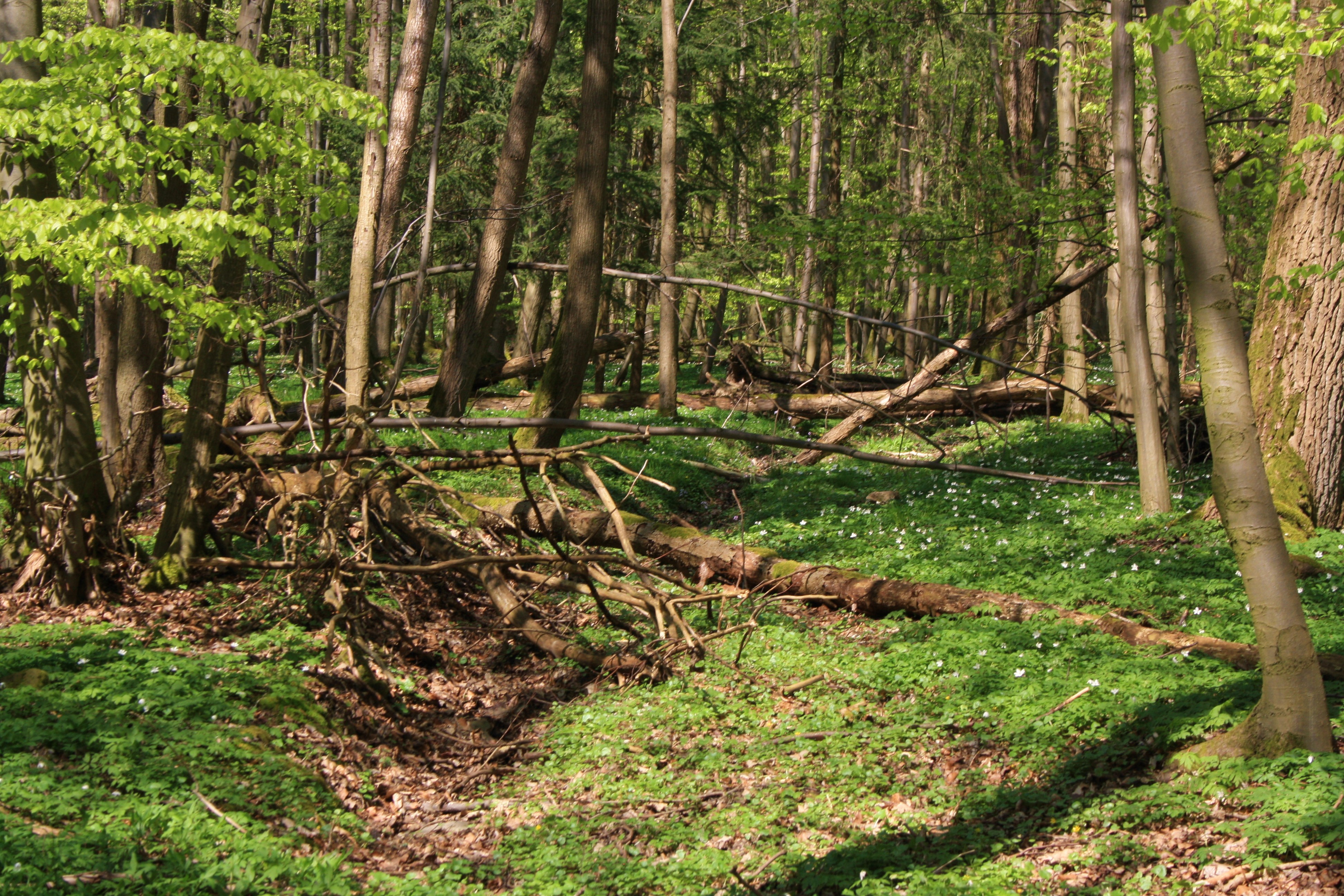 Naturschutzgebiet Breiter Berg bei Haselstein